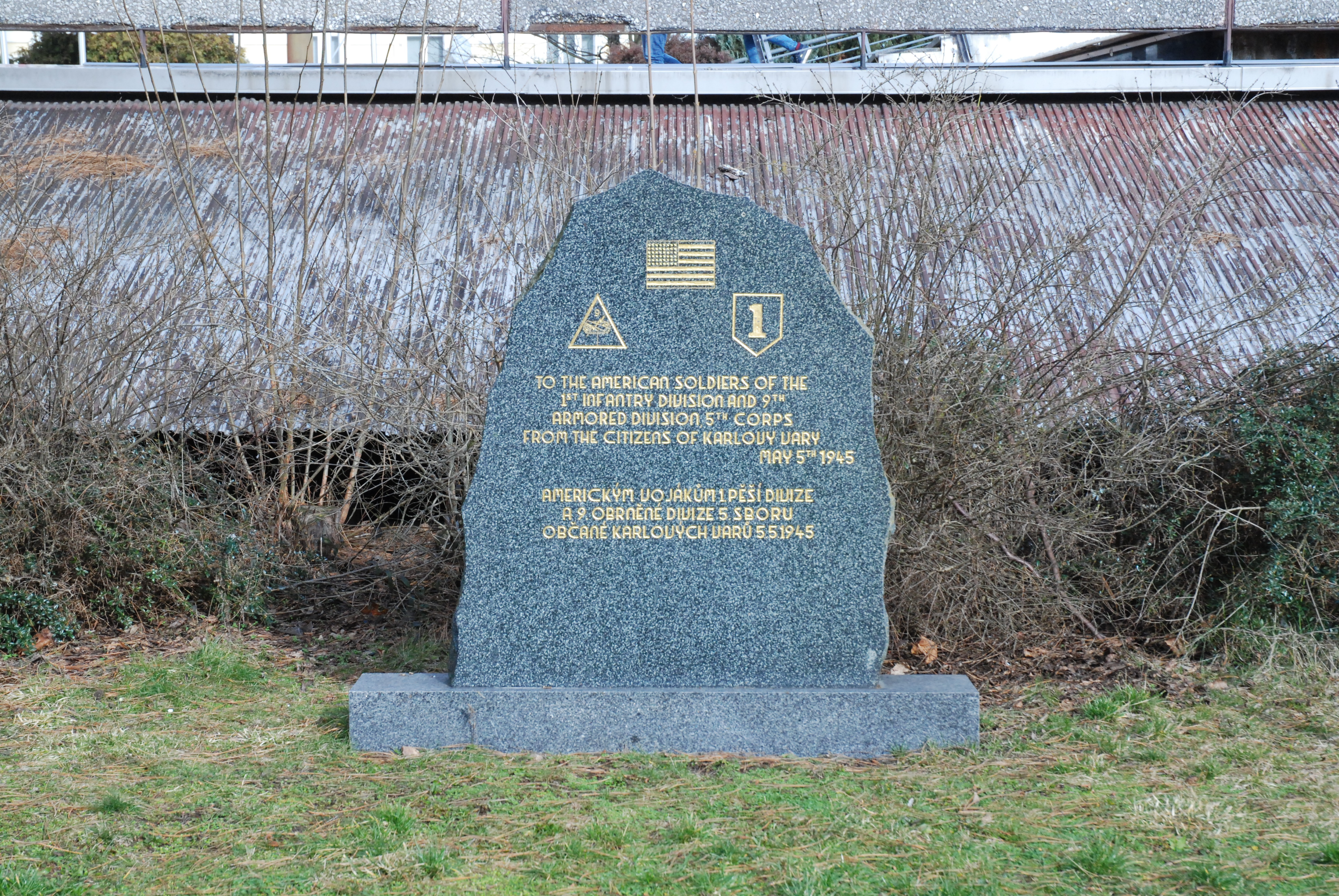 Pomník vojákům Americké armády v Karlových Varech